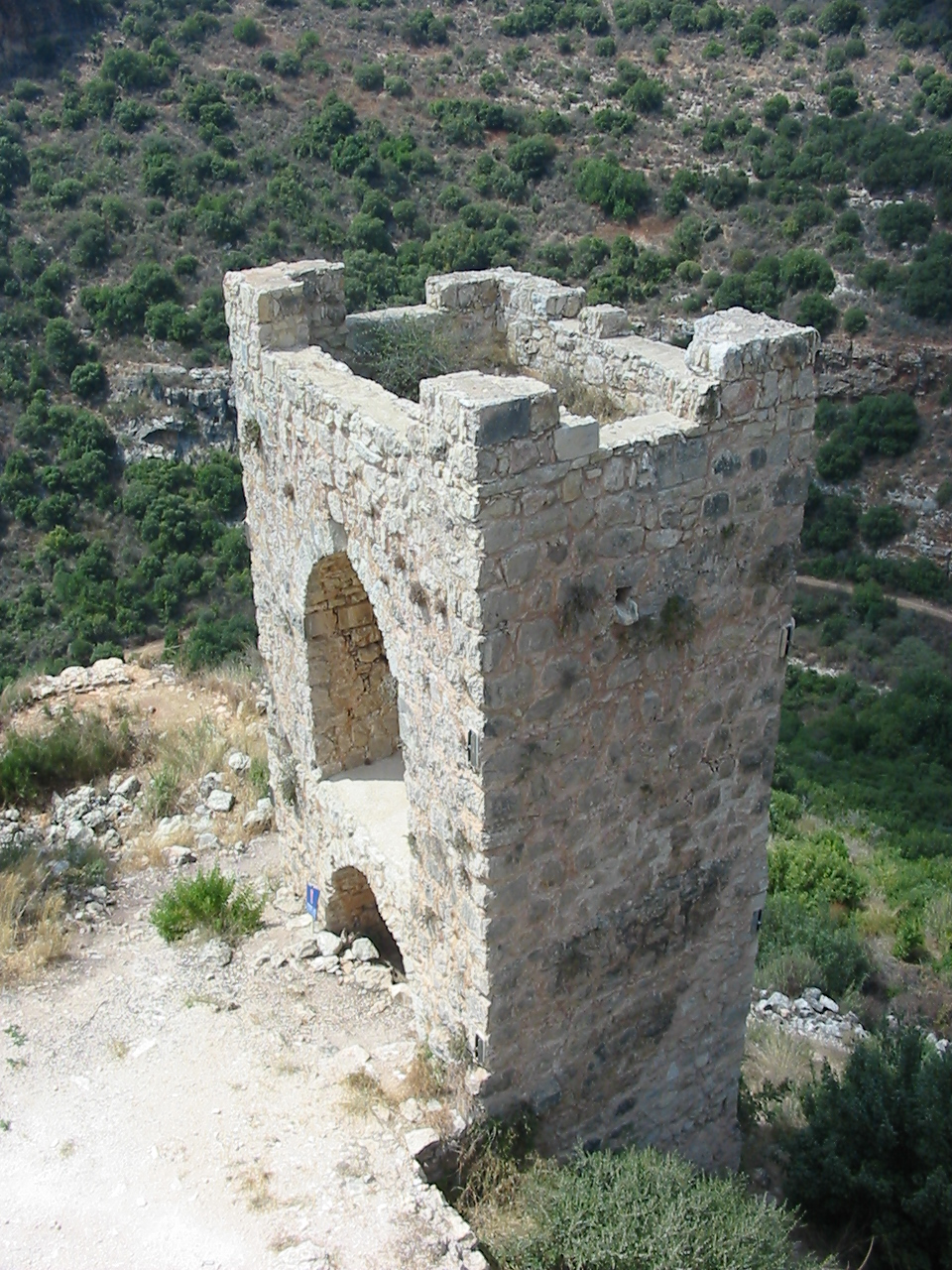 הצריח הצפוני במבצר מונפור